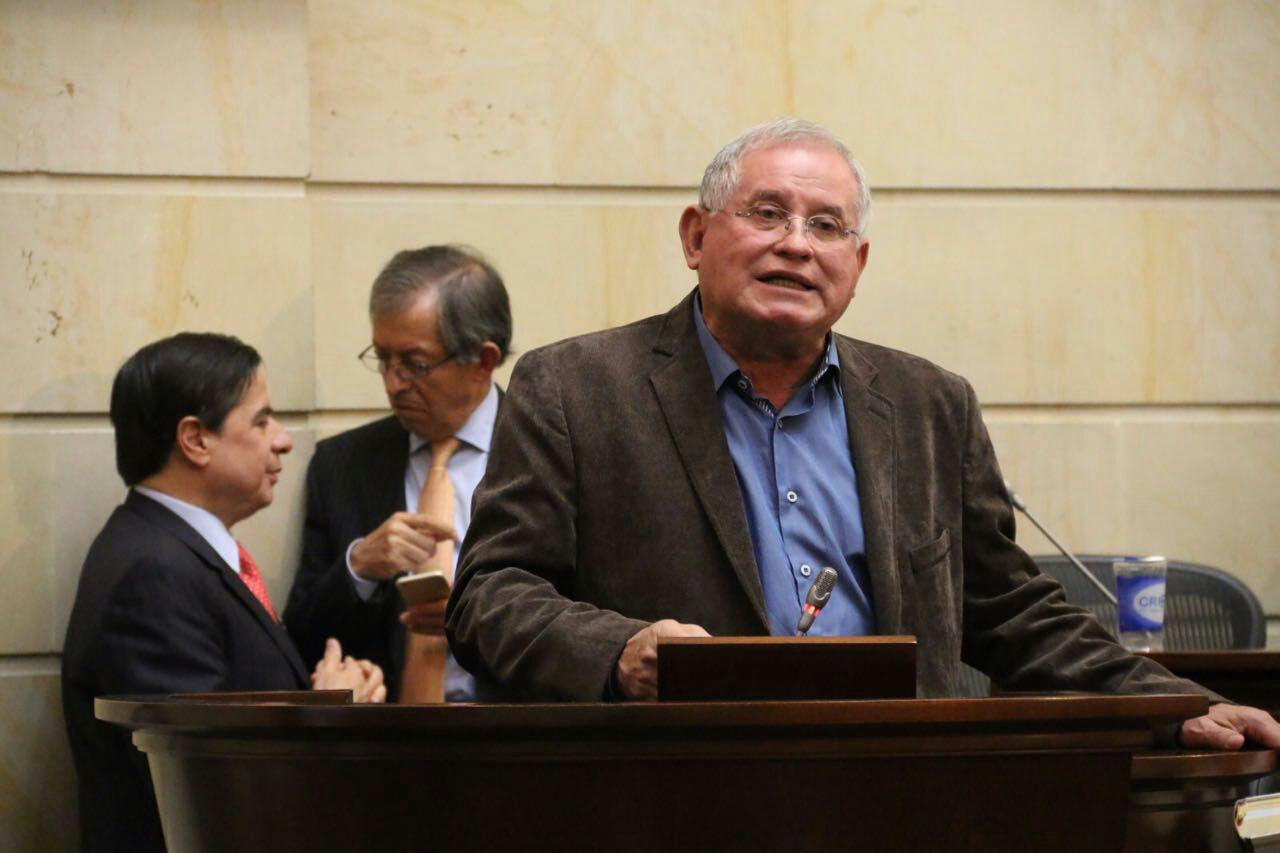 Pablo Cruz en el Senado de Colombia